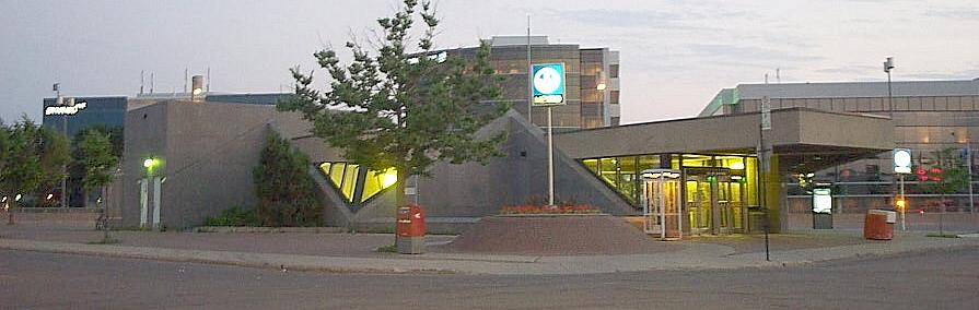 Édicule de la station De La Savane du métro de Montréal.